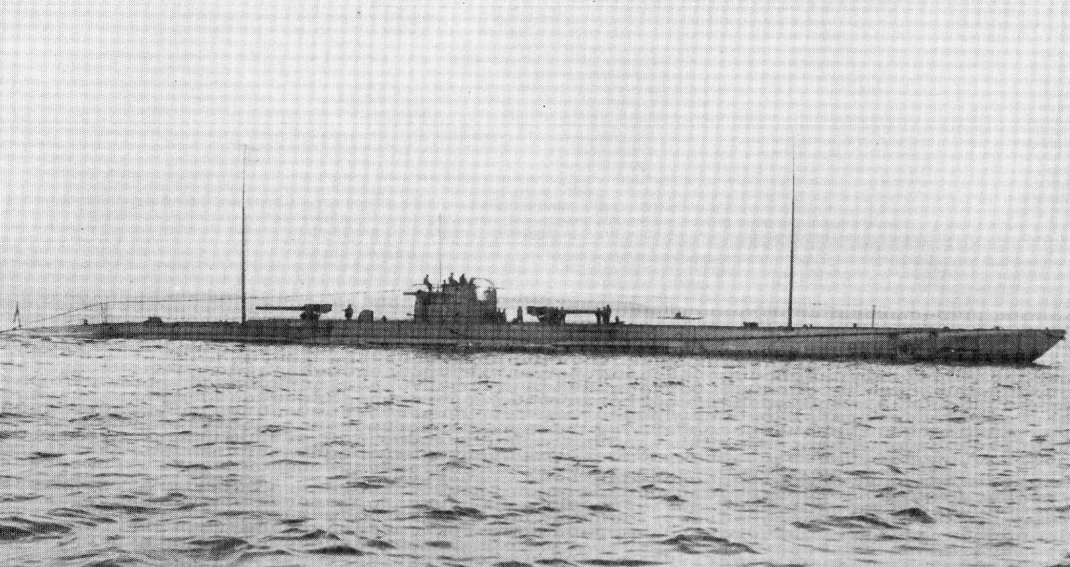 U 139 der Kaiserlichen Marine. Aufnahmeort und -zeit unbekannt.